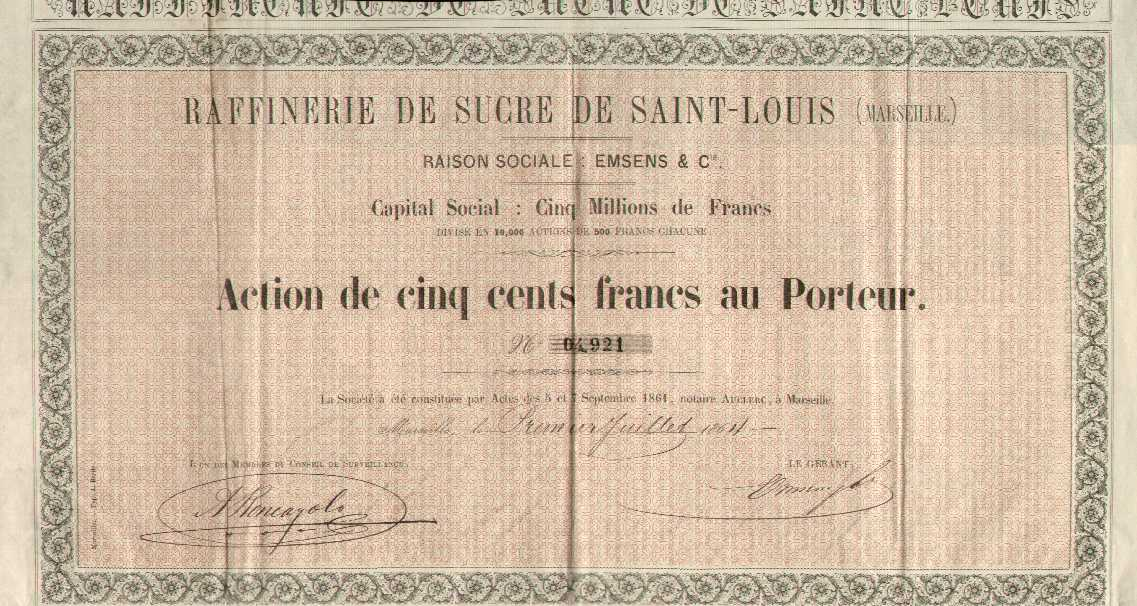 action au porteur 1893